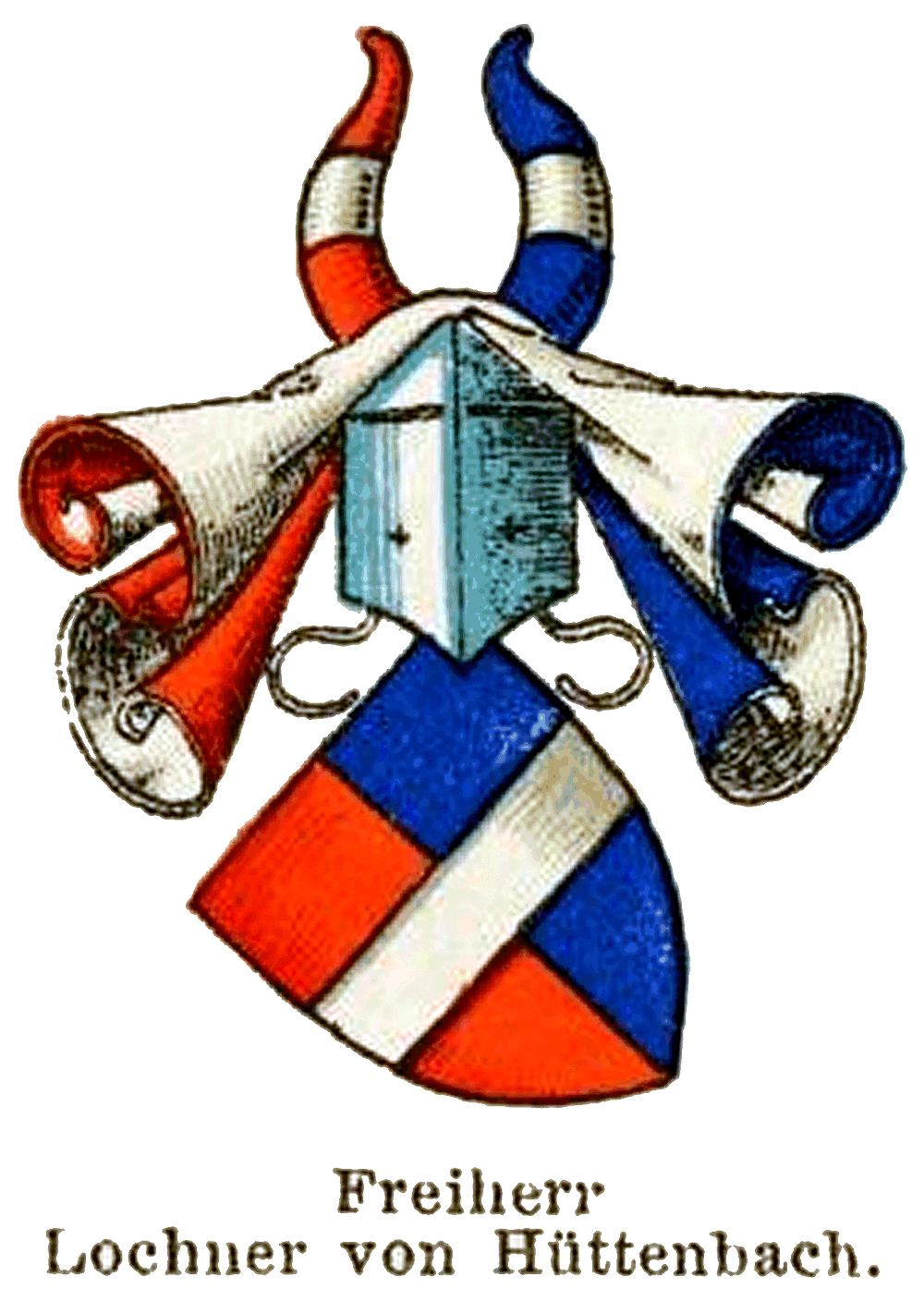 Wappen der Lochner von Hüttenbach